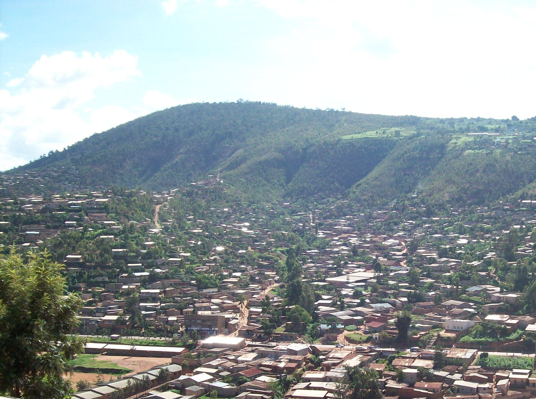 Mount Kigali in Kigali, Rwanda